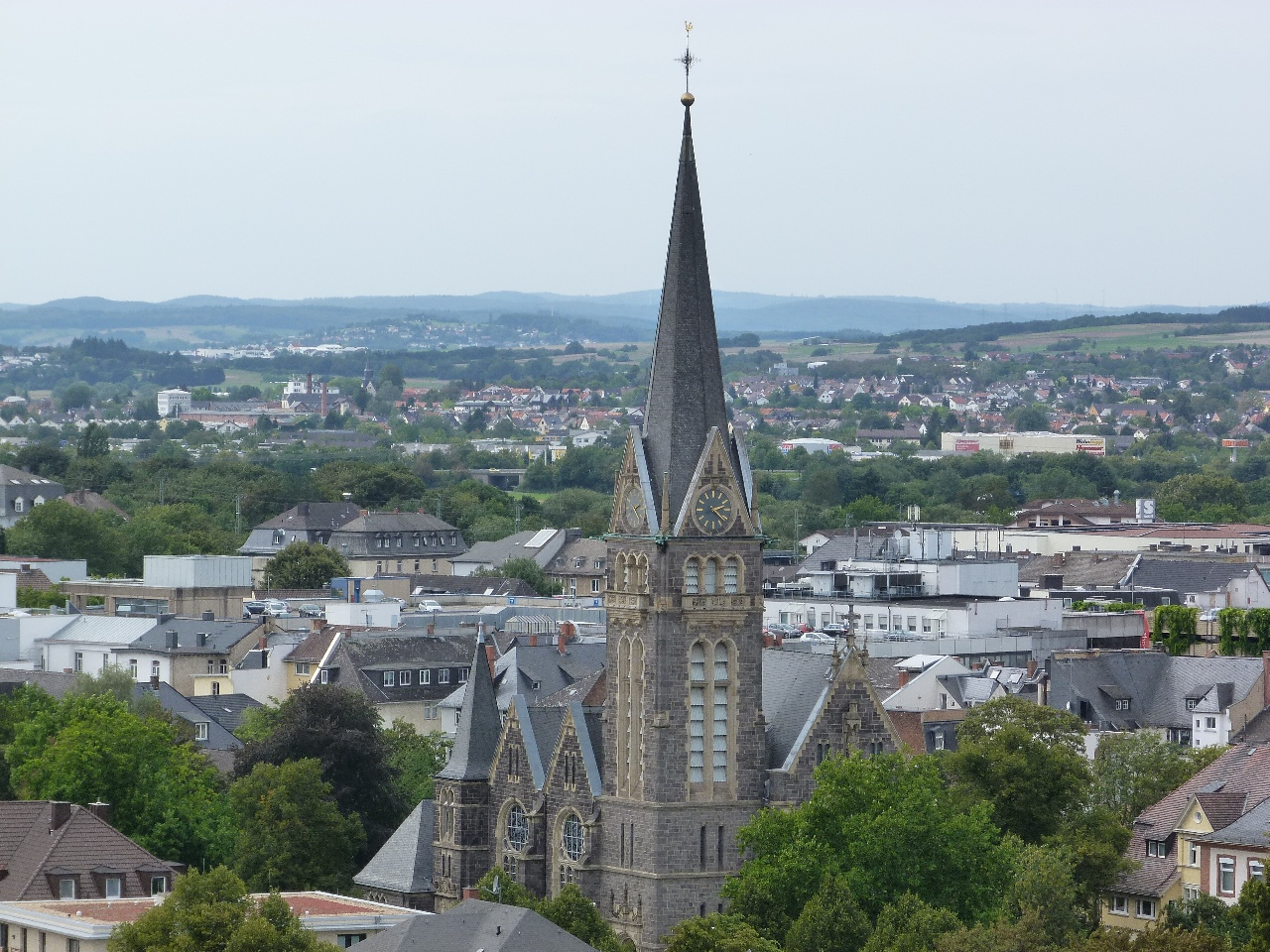 Johanneskirche in Gießen, Hessen